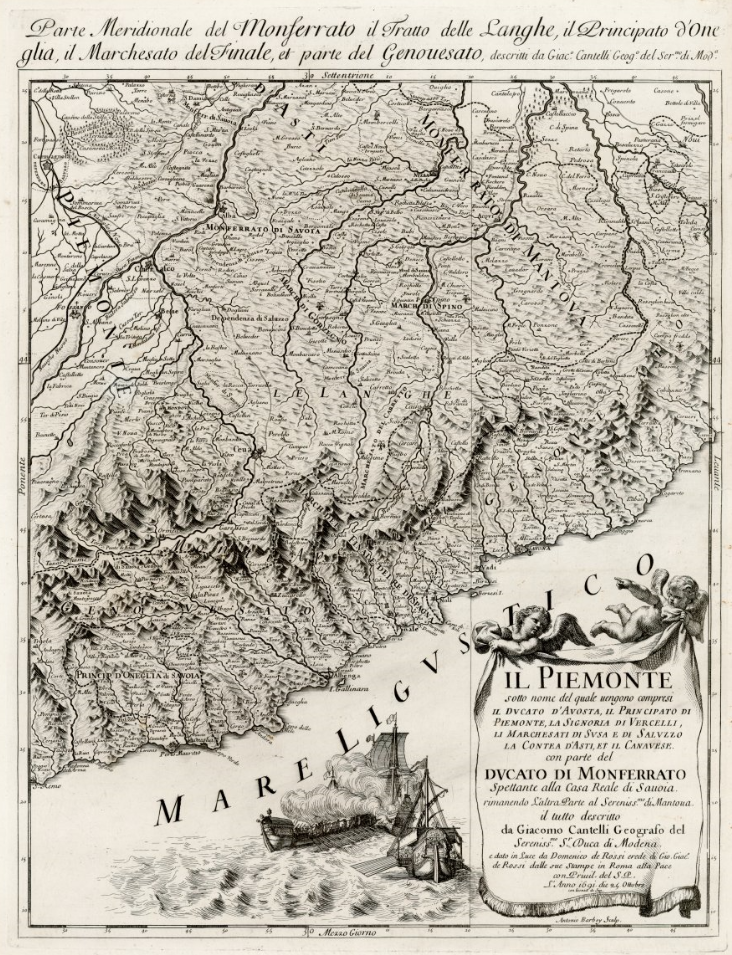 Carta geografica raffigurante la parte meridionale del Monferrato, le Langhe, Oneglia, Finale e parte del Genovesato. In basso a destra titolo entro drappo sostenuto da due putti alati, accanto vascelli che navigano in acque marine.